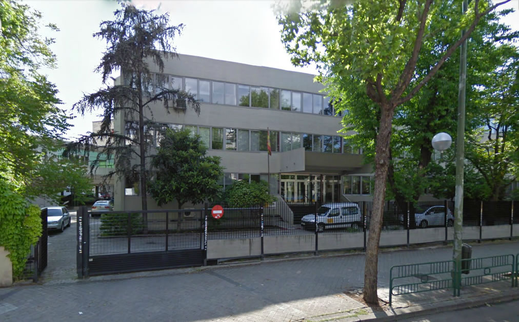 Sede de la Red de Bibliotecas y Archivos del CSIC y de Digital.CSIC